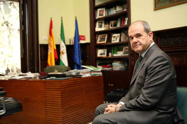 Manuel Chaves, político andaluz